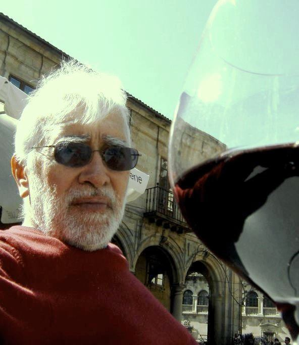 Novela: La mitad roja del puente. Nacaome Aktion.